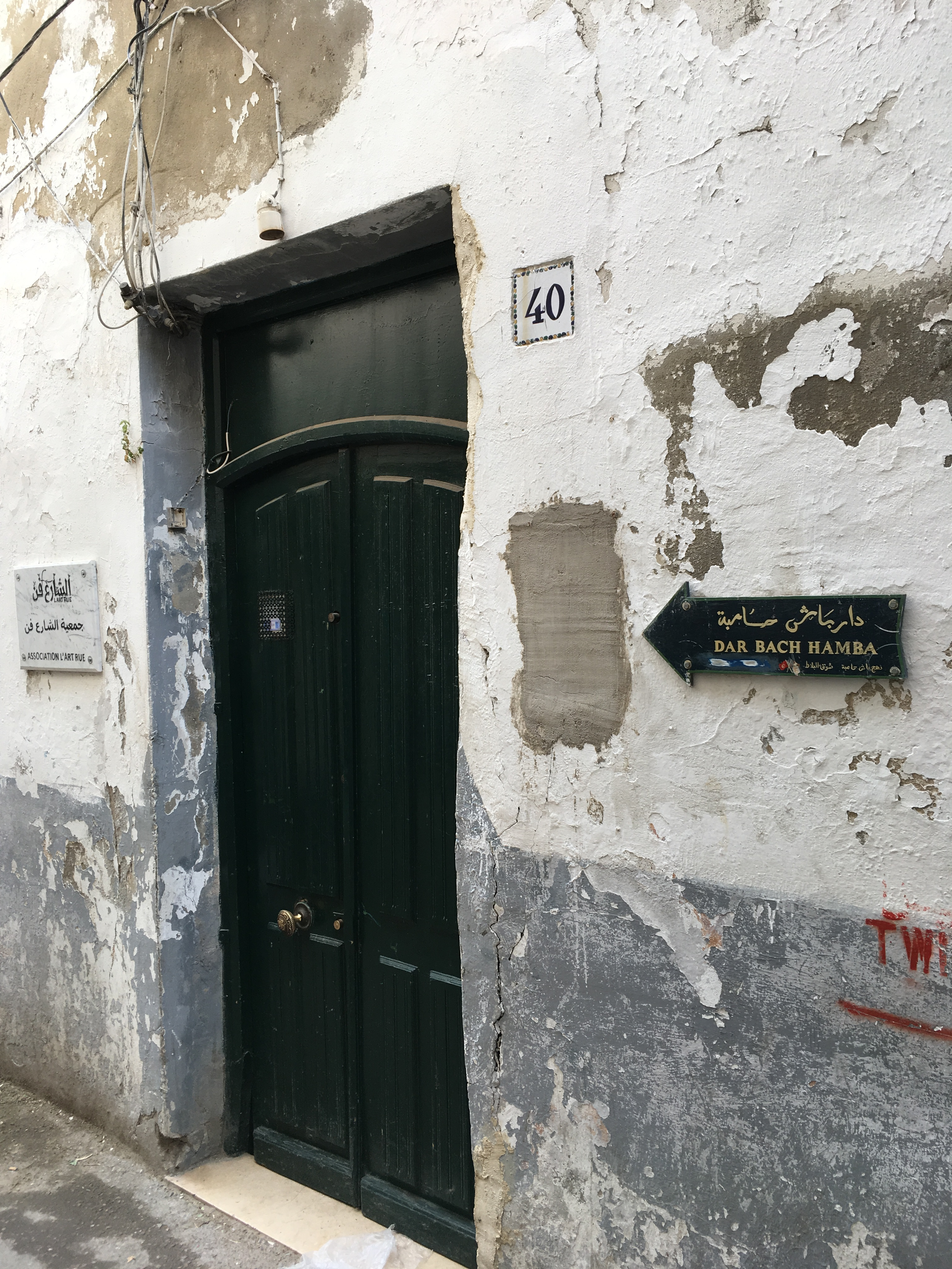 La médina de Tunis, Tunisie مدينة تونس العتيقة ، تونس